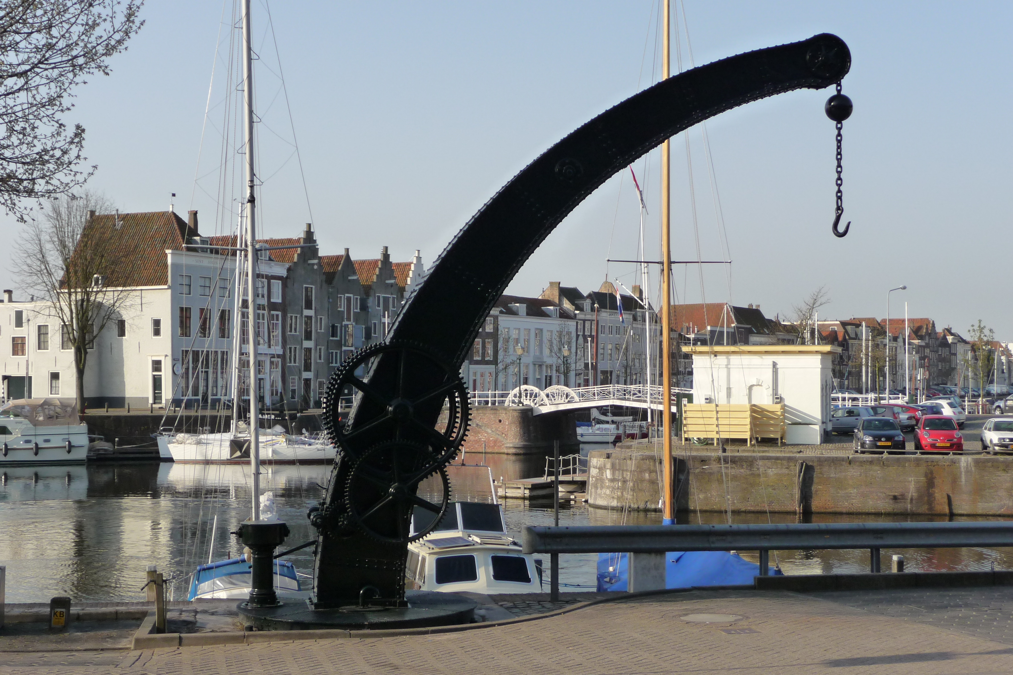 Havenkraan (loskraan) aan de Rotterdamsekaai in Middelburg van het type Fairbairn crane, gebouwd in 1861 door ijzergieterij De Prins van Oranje van weduwe A. Sterkman & Zoon te 's-Gravenhage